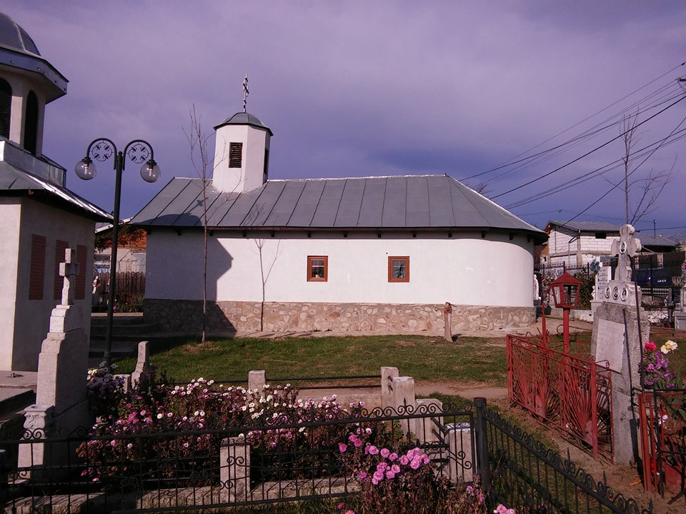 Biserica de lemn „Sf. Nicolae”, „Adormirea Maicii Domnului” (din cimitir)